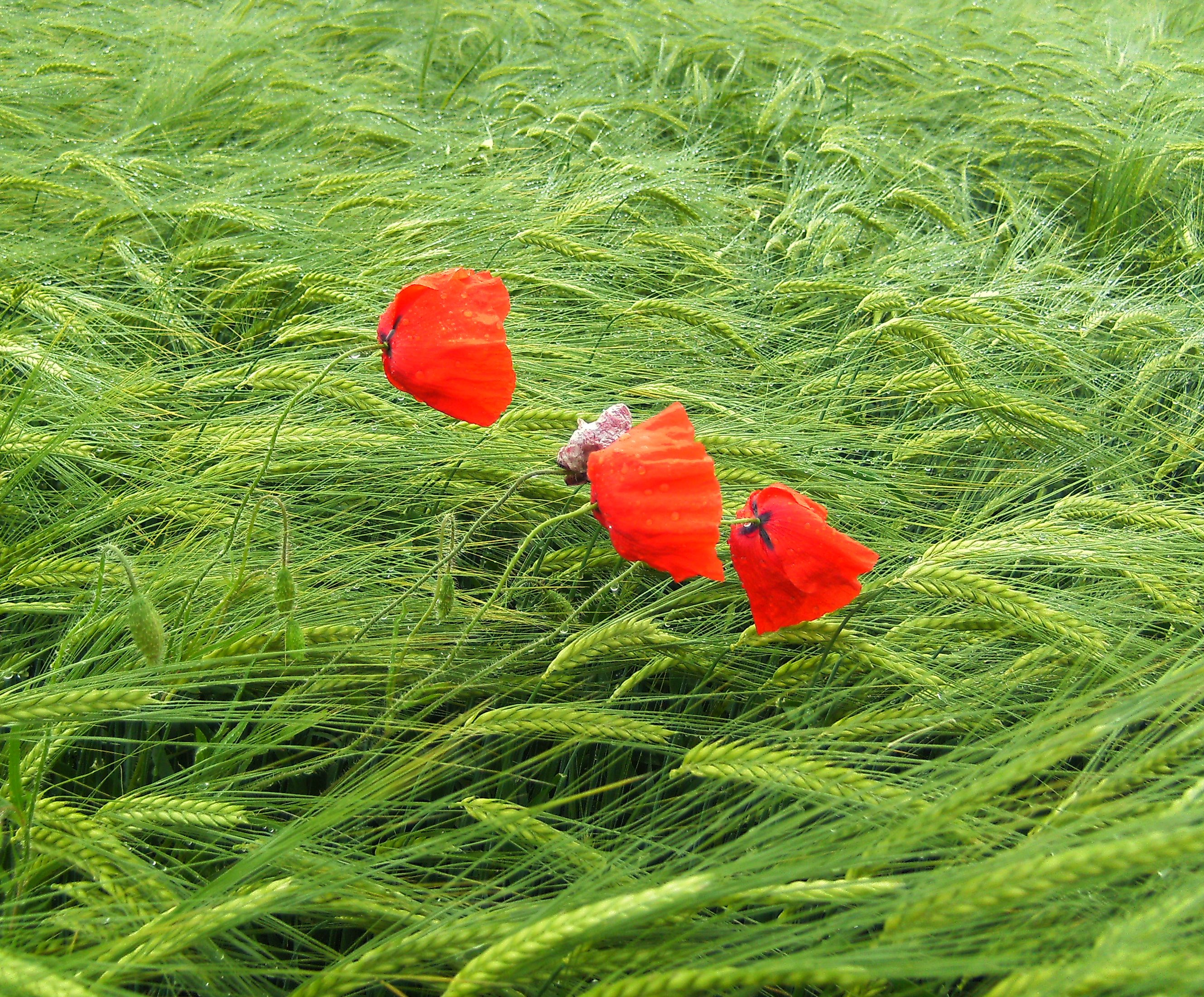 Wintergerste